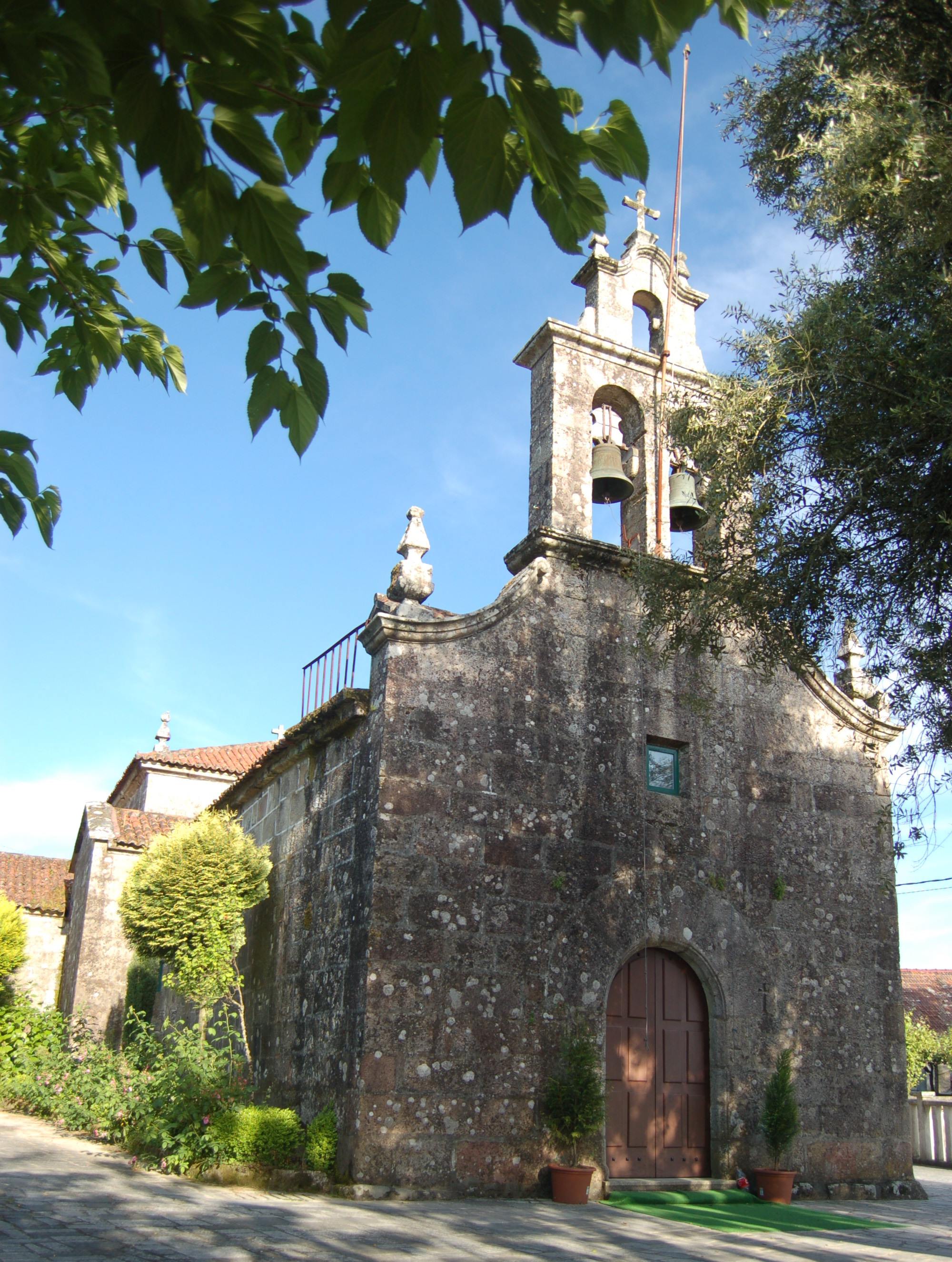 Igrexa parroquial de San Bartolomeu de Fozara (Ponteareas)